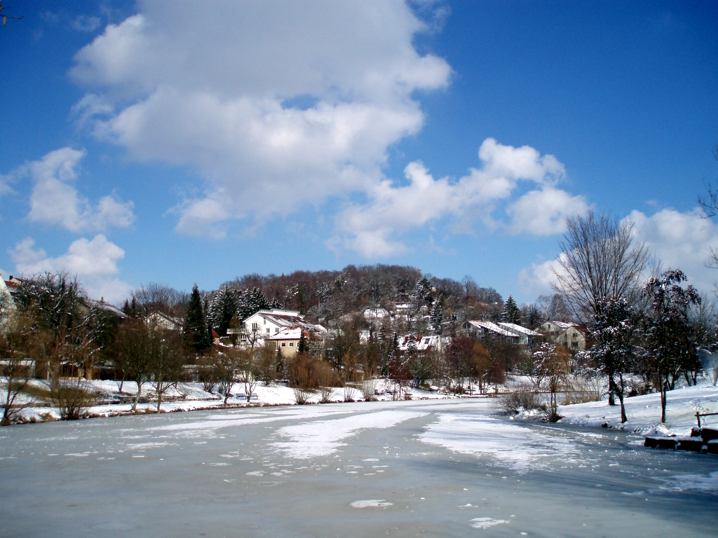 Das Photo zeigt den Lindenbachsee in Weilimdorf im Winter 2006 zugefroren, im Hintergrund das "Horn" am Lemberg. Selbst aufgenommen im März 2006 durch Benutzer MBL.